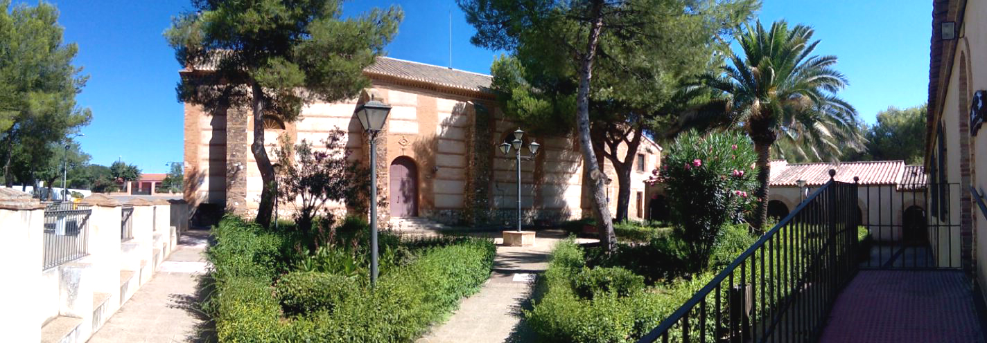 Jardines aledaños a la Ermita Grande de Nuestra Señora del Monte